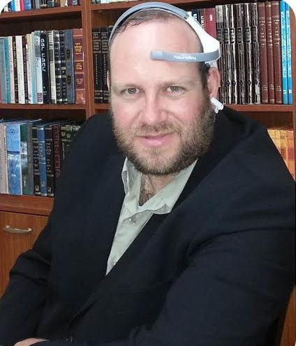 ניב הדר